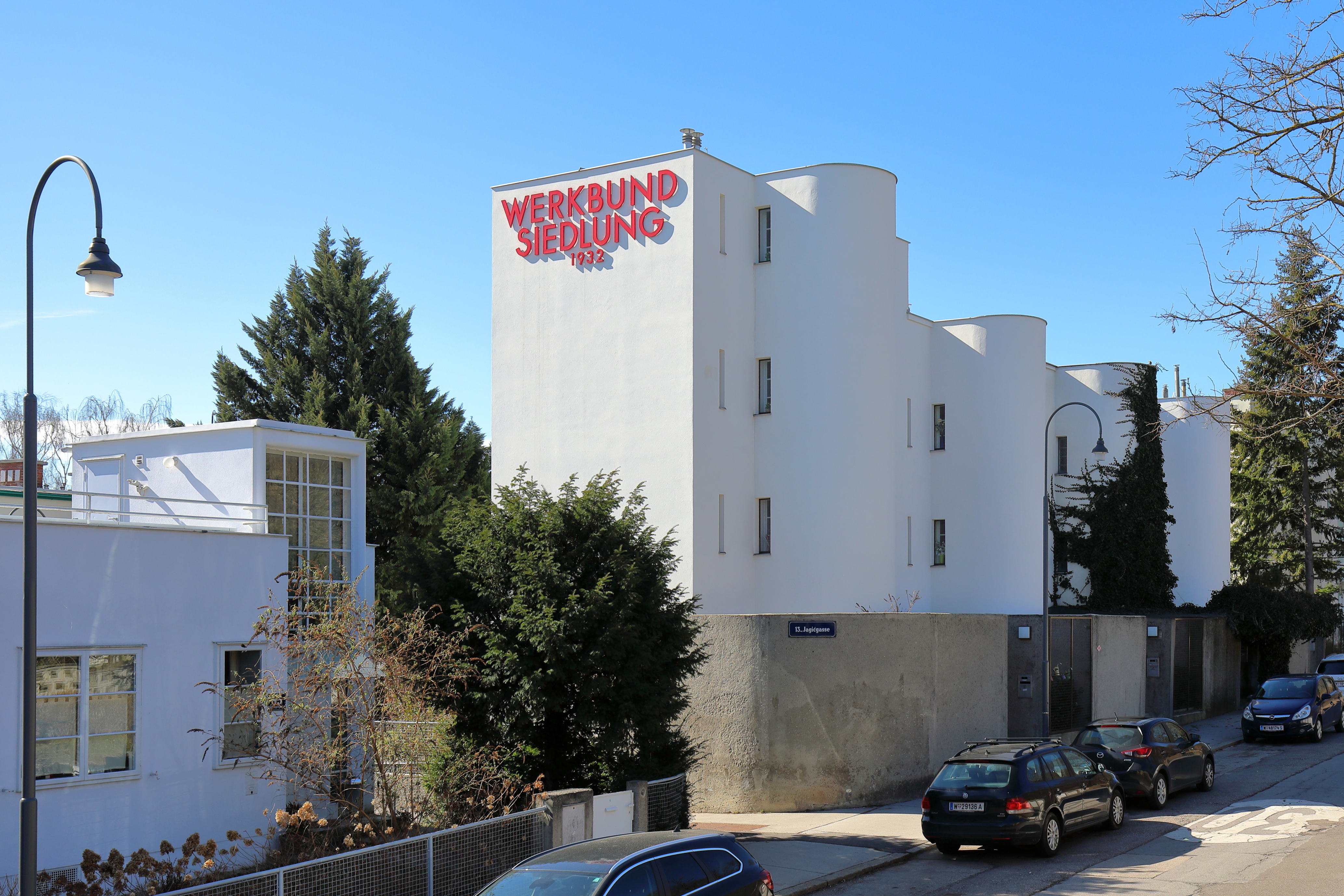 Die 4 Reihenhäuser Veitingergasse 87-93 der Werkbundsiedlung Wien im 13. Wiener Gemeindebezirk Hietzing.Errichtet wurden die 4 Reihenhäuser um 1930 nach Plänen des französischen Architekten André Lurçat. Ganz links ist ein Teil des Hauses Veitingergasse 85 zu sehen, das nach Plänen des Architekten Josef Hoffmann errichtet wurde.Die Häuser entstanden von 1929 bis 1932 im Zuge des Baues einer Mustersiedlung von etwa 70 Häusern mit rund 50 verschiedenen Haustypen. An der Planung der einzelnen Häuser beteiligten sich über 30 Architekten. This media shows the Vienna residential building (Gemeindebau) with the ID 61.